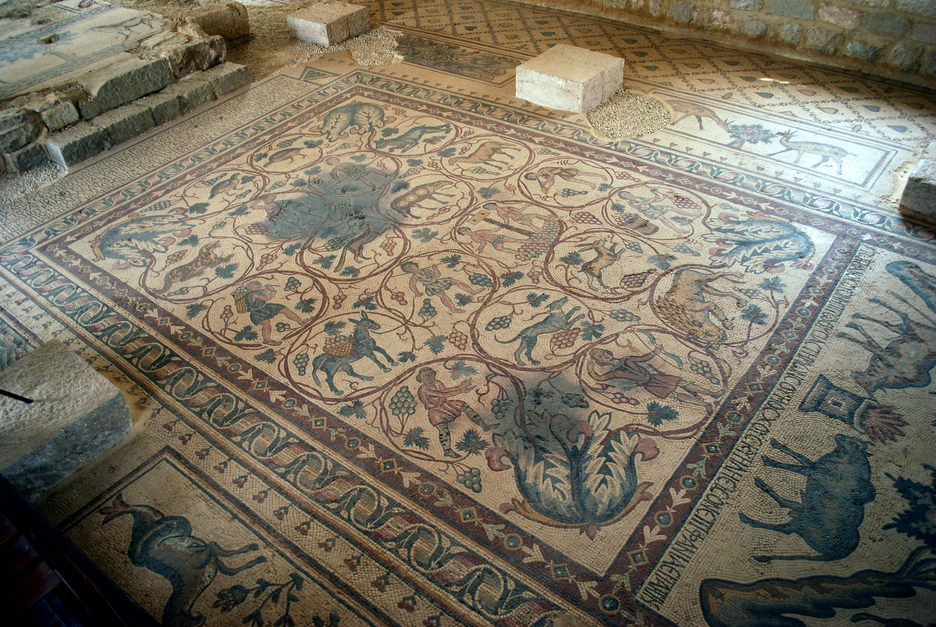 Mosaïque de l'ancienne église Saint-Lot et Saint-Procope à Khirbet al-Mukhayyat.